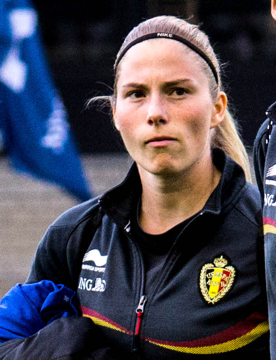 Jana Coryn (4) and Lore Vanschoenwinkel (19)